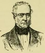 Marquês de Abrantes.